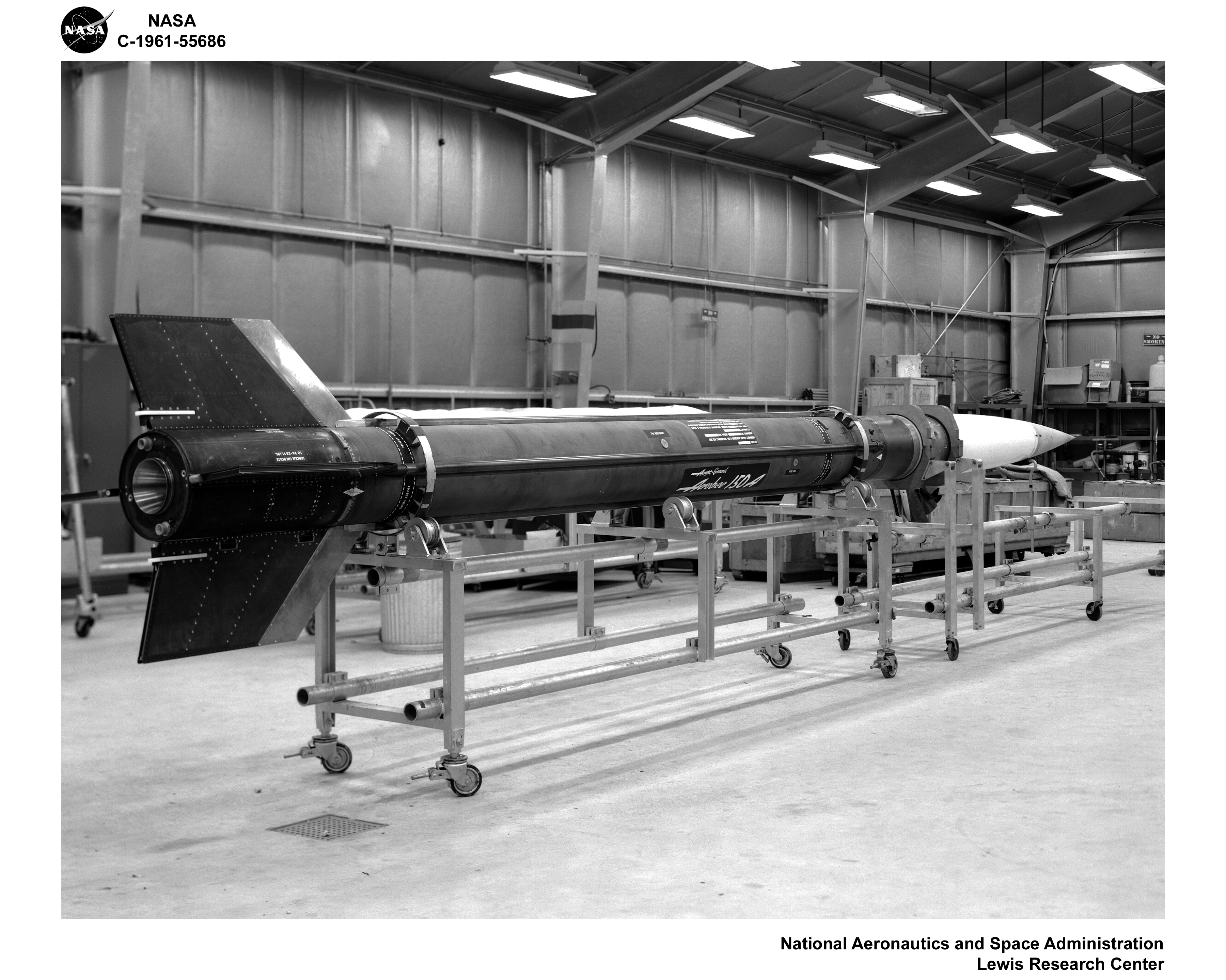 Fusée sonde Aerobee 150 (étage supérieur uniquement)